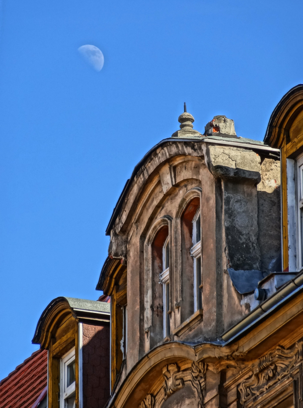 Kamienica ul. Cieszkowskiego 7 w Bydgoszczy (1901-1902, Karl Bergner)